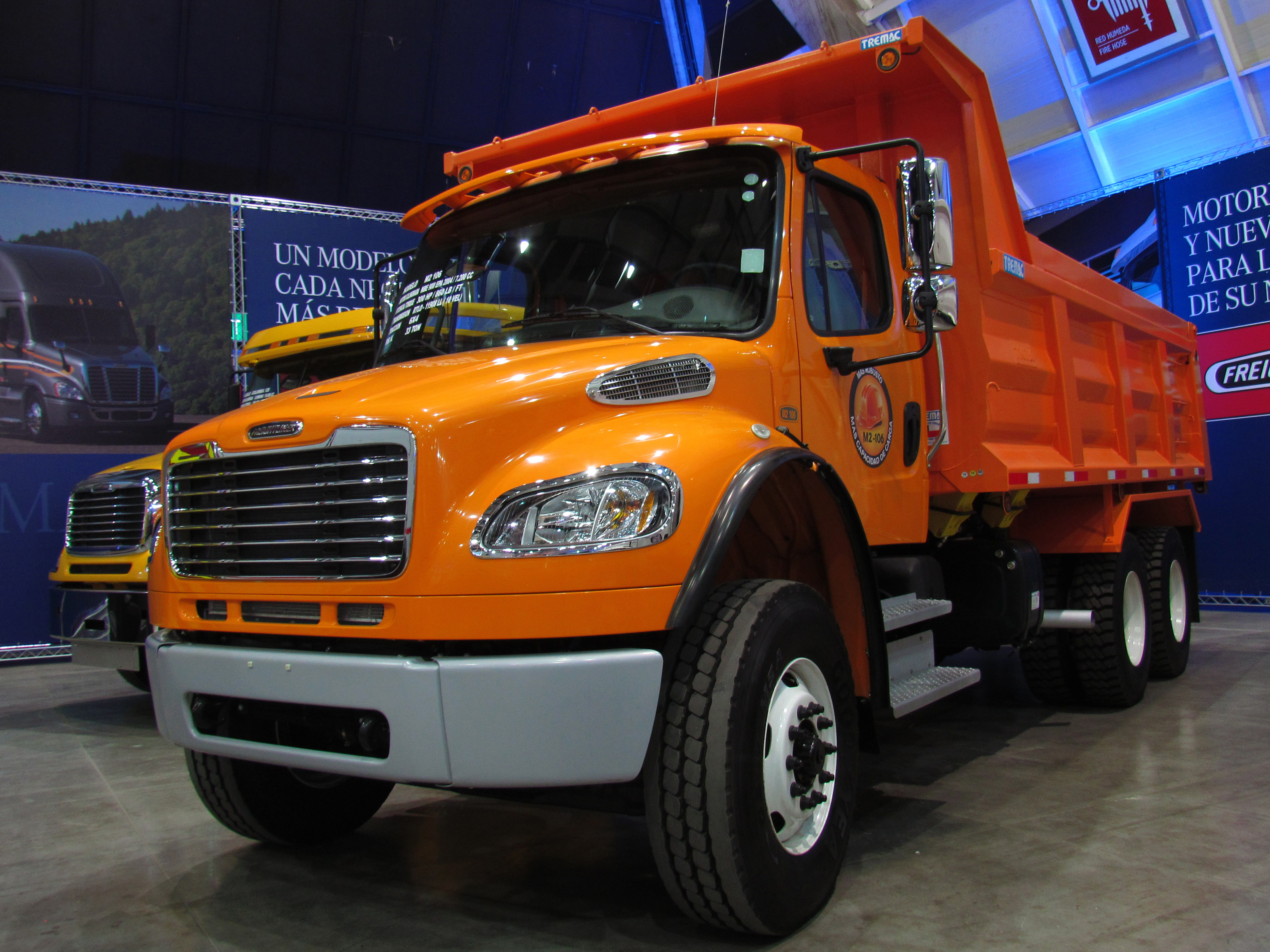 Freightliner M2 106 6x4 2014